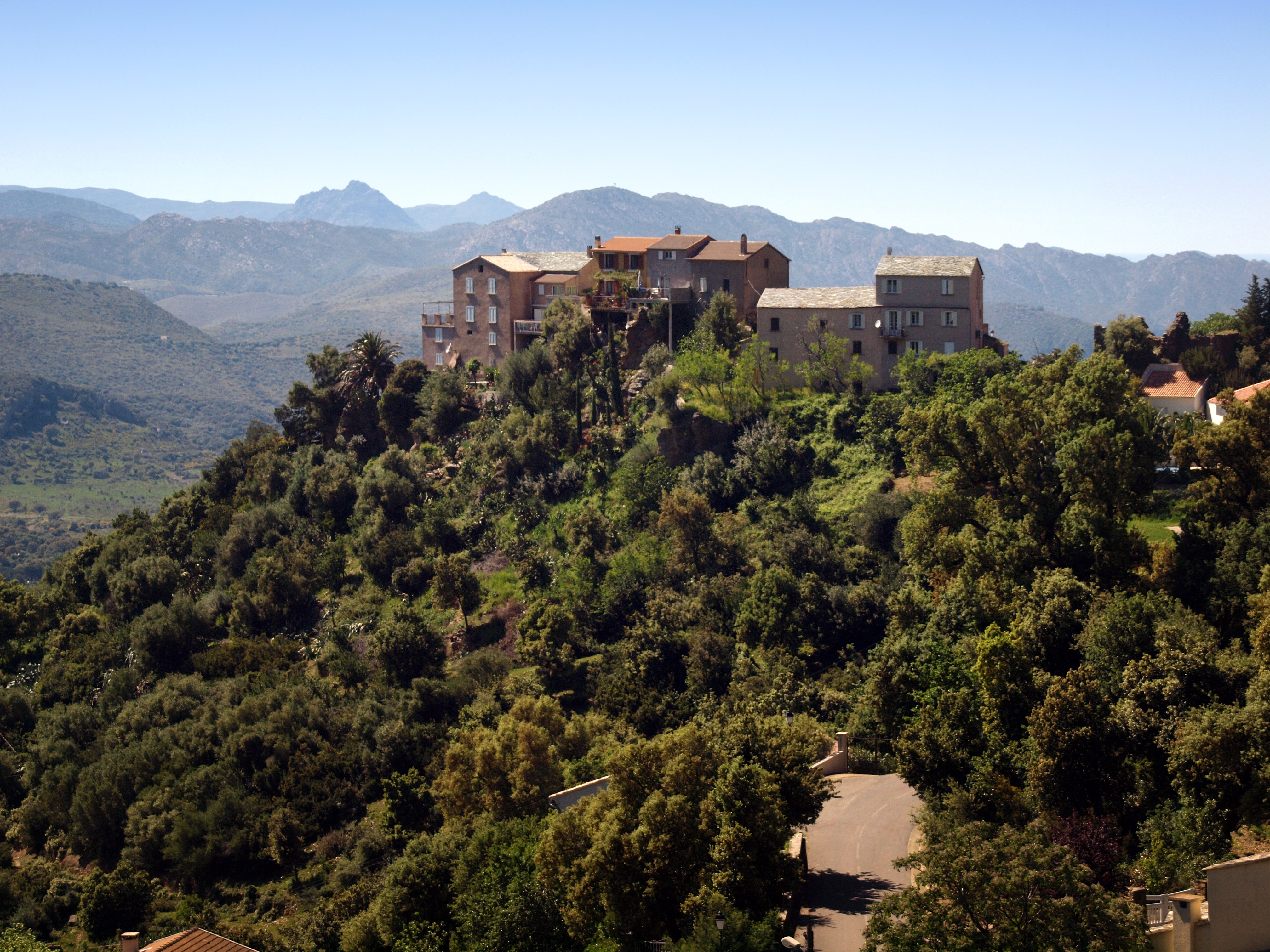 Poggio-d'Oletta, Nebbio (Corse) - Hameau de Monticello